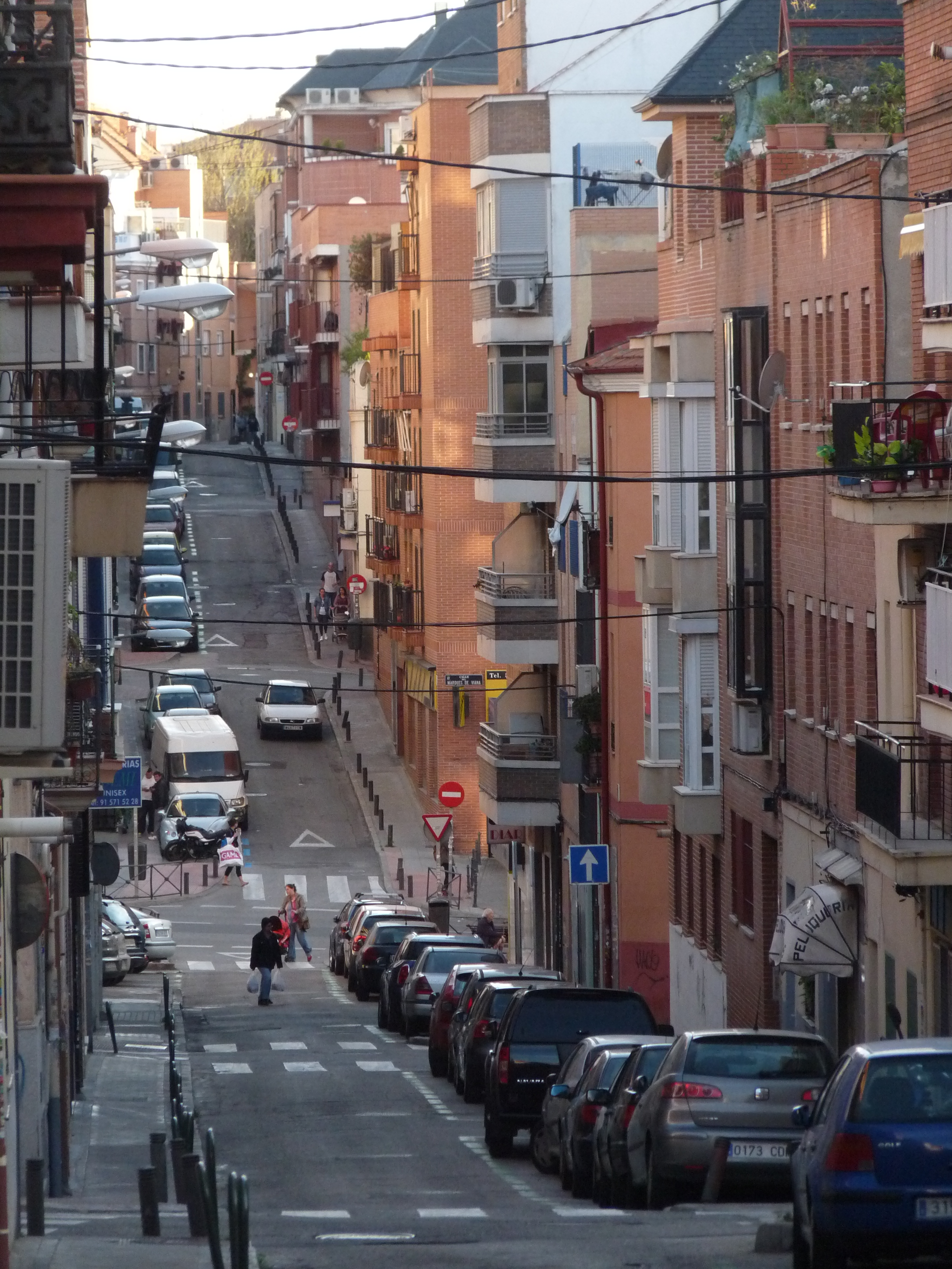 Calle del Cactus, en primer plano barrio de Valdeacederas, más adelante cruce con la calle Marqués de Viana y barrio de Berruguete, Madrid, España.